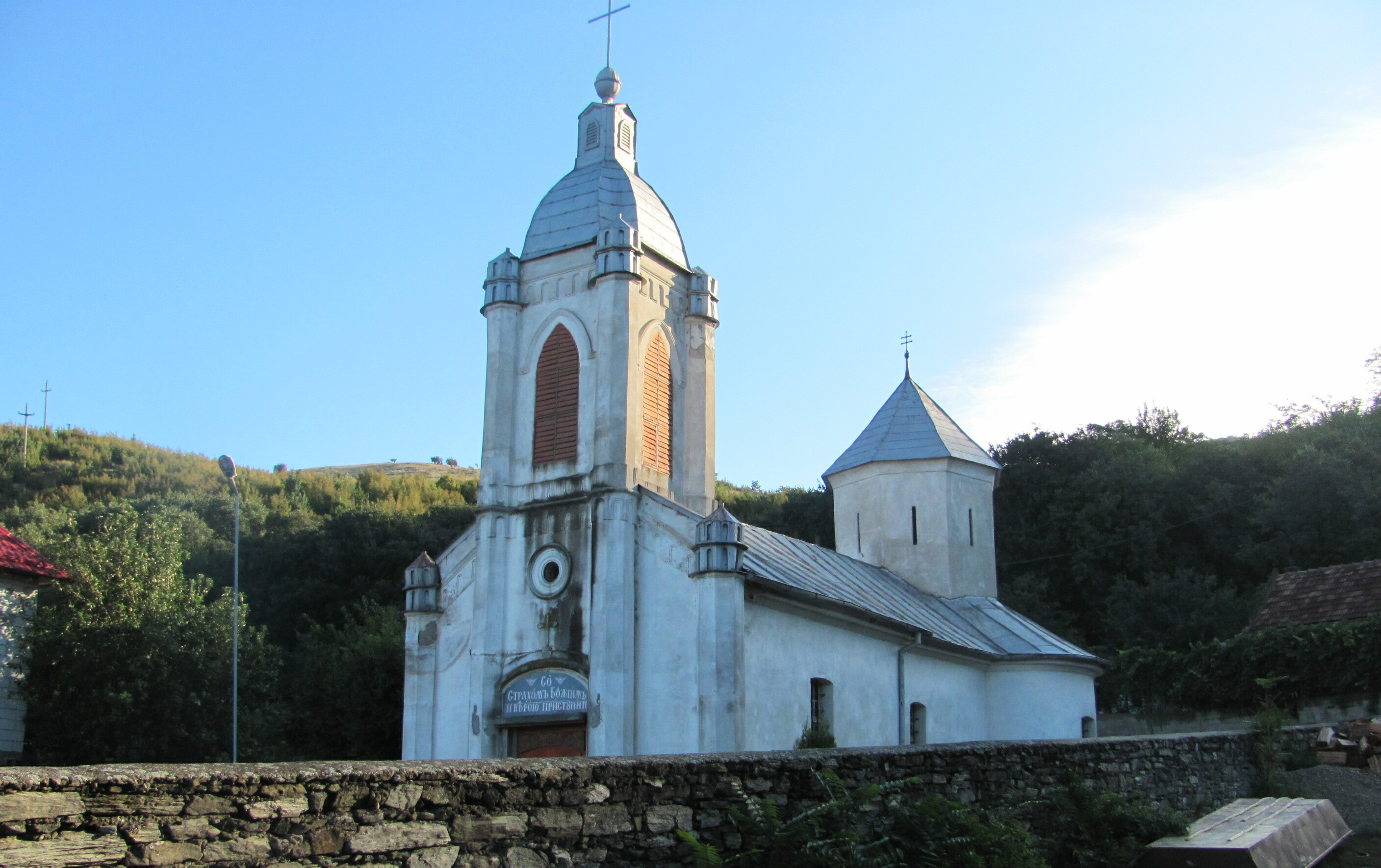 Manastirea sarbeasca "Sfantul Sava" - sat Bazias,com.Socol, jud.Caras-Severin - cod LMI - CS-II-a-A-10972